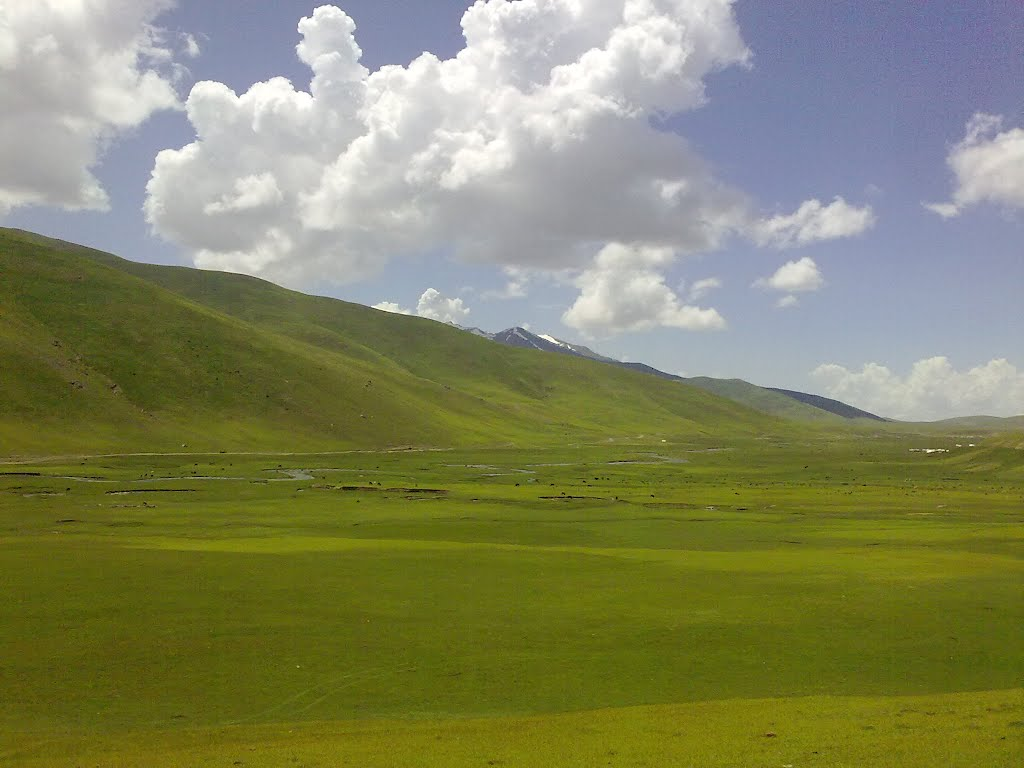 چراگاه ای دشت شیوه